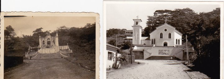 Ruínas em Outubro de 1945(esquerda) e em Junho de 1970